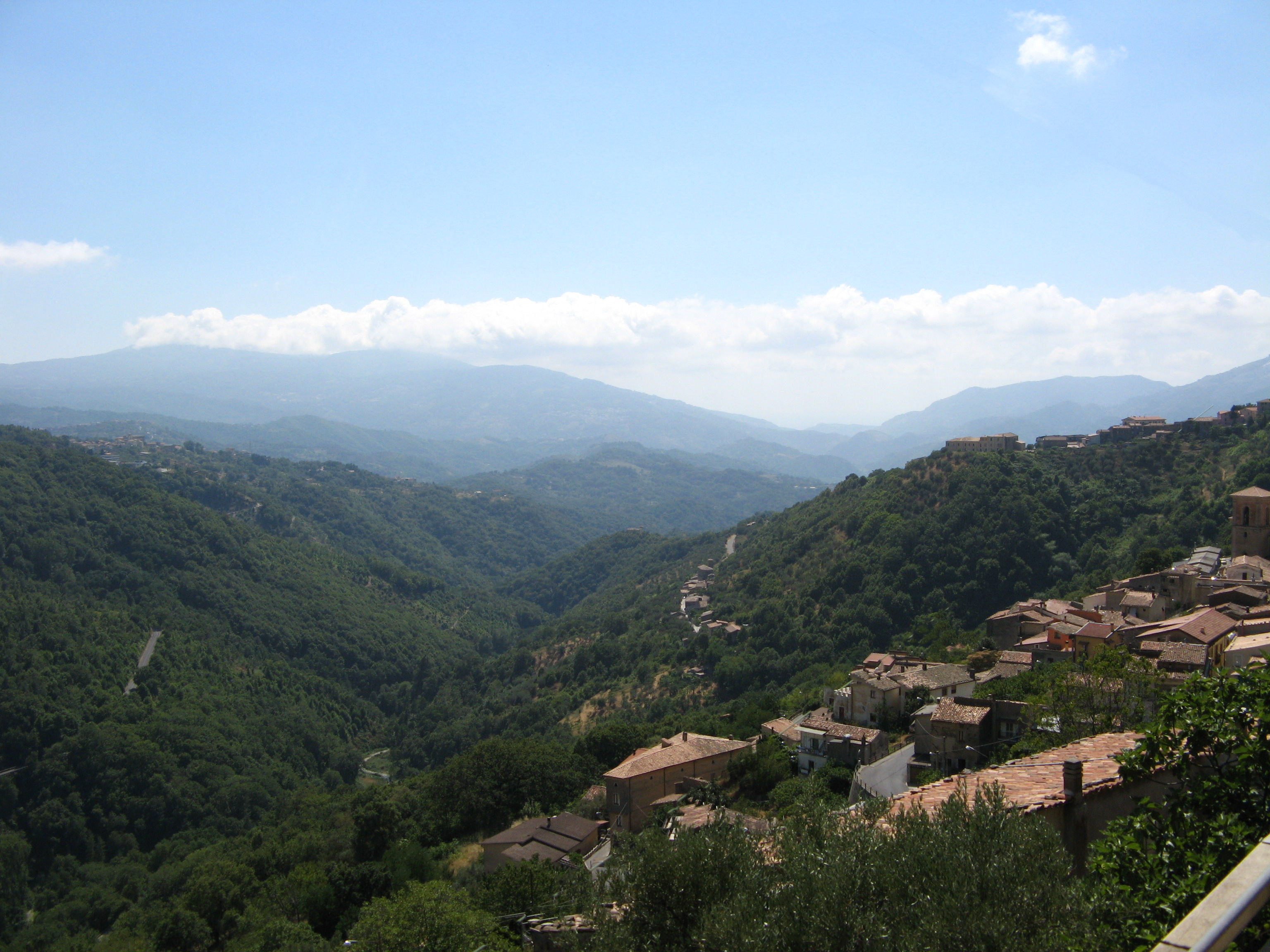 Valle del Savuto, vista da Scigliano